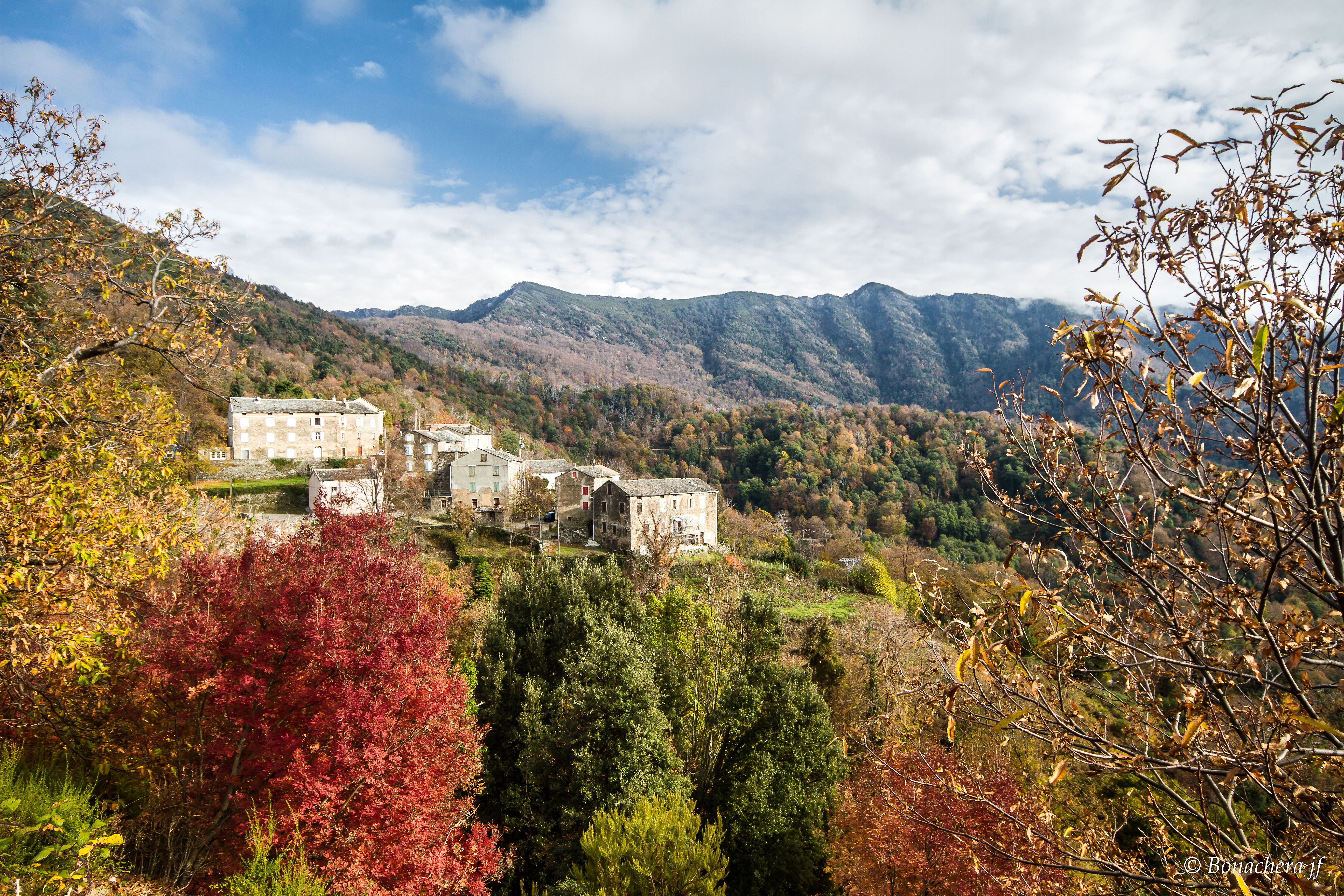 le village de taranu (Tarrano)